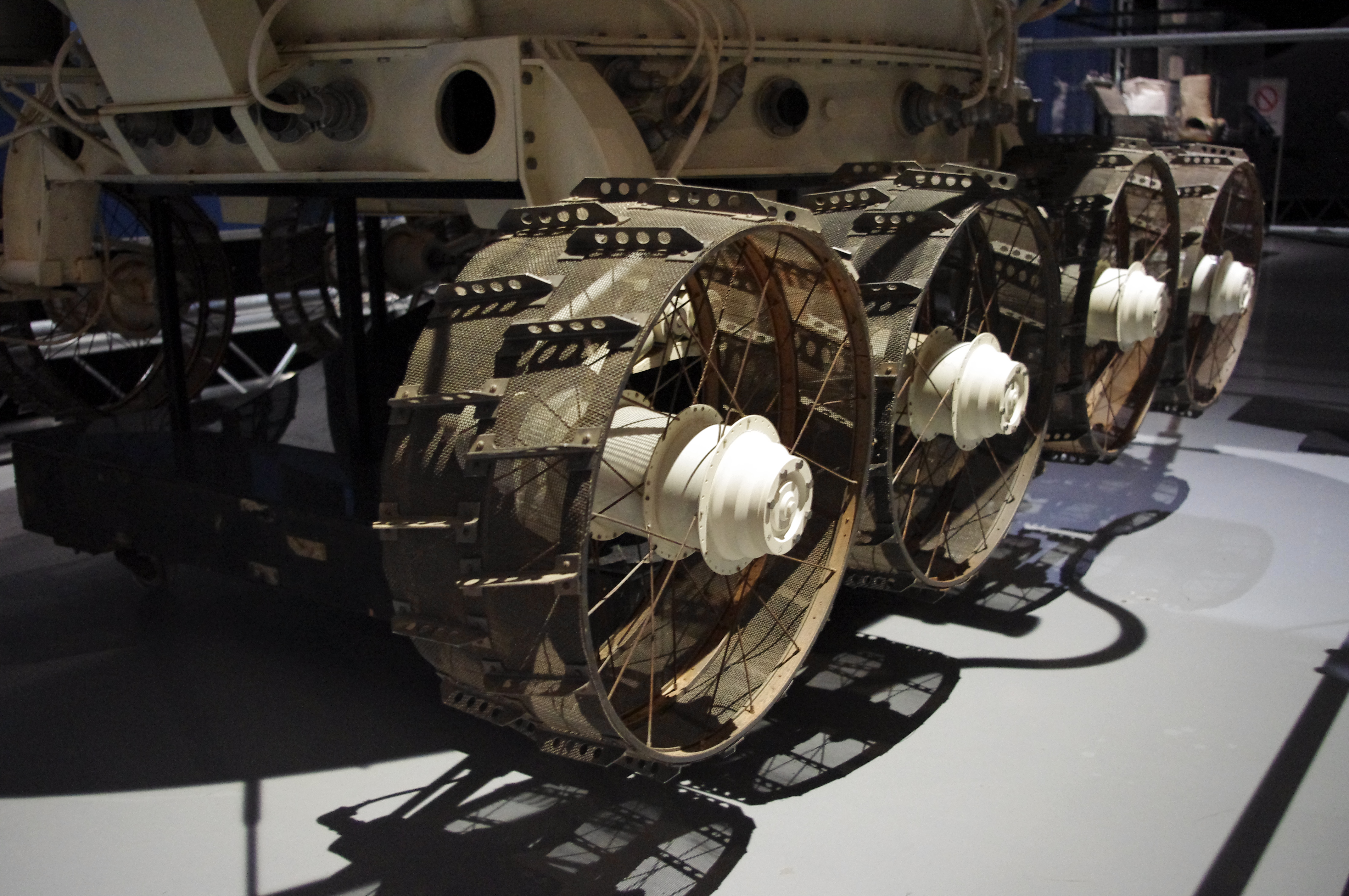 From "NASA - A Human Adventure" at Tekniska museet in Stockholm.